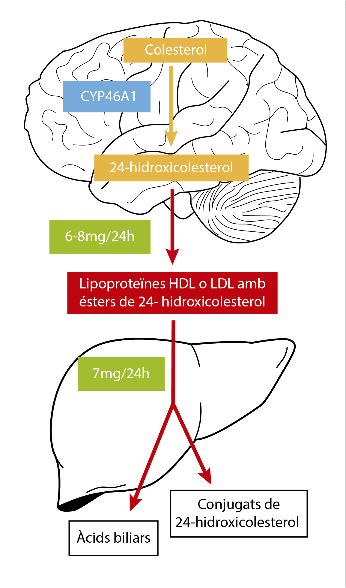 Relació entre la formació cerebral del 24-hidroxicolesterol i la seva eliminació hepàtica